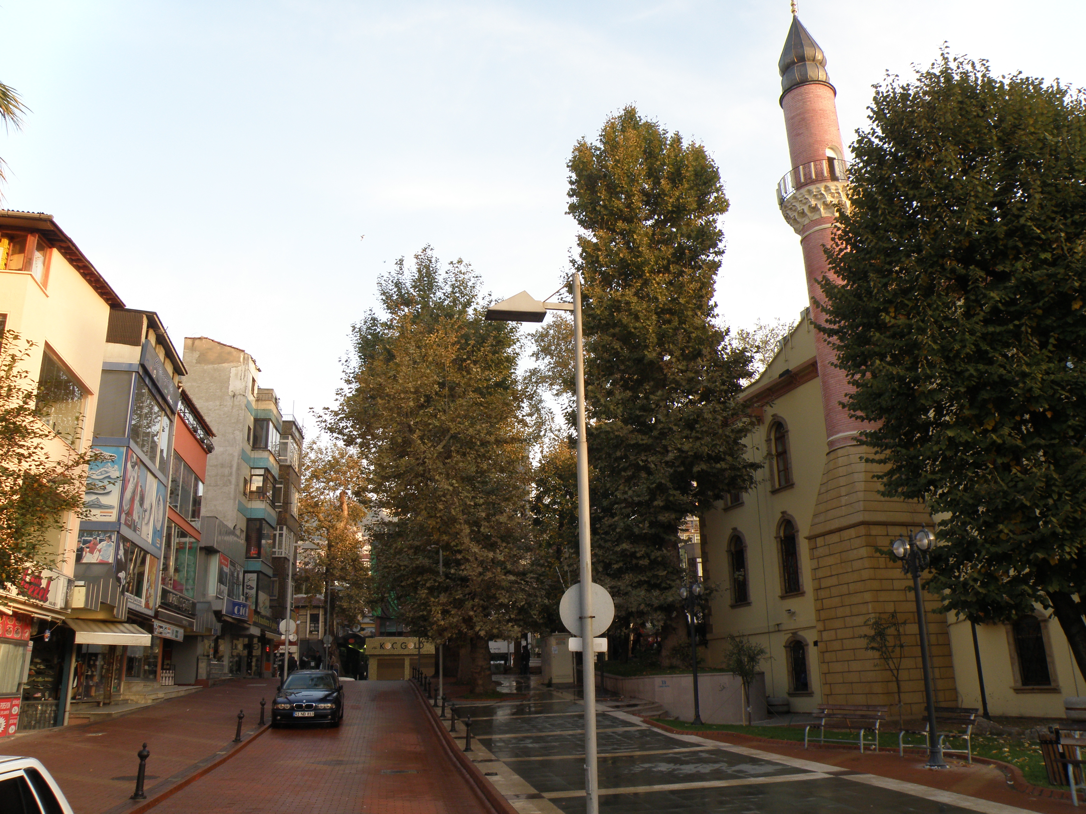 Fevziye mosque & minaret *©Abdullah Kiyga